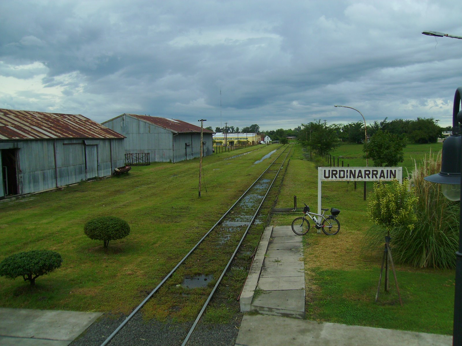 Vista hacia el sudoeste, o en el sentido descendente. Ferrocarril General Urquiza.